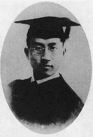 1921年邹韬奋在上海圣约翰大学毕业照